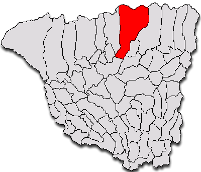 Categorie:Hărţi ale judeţului Gorj